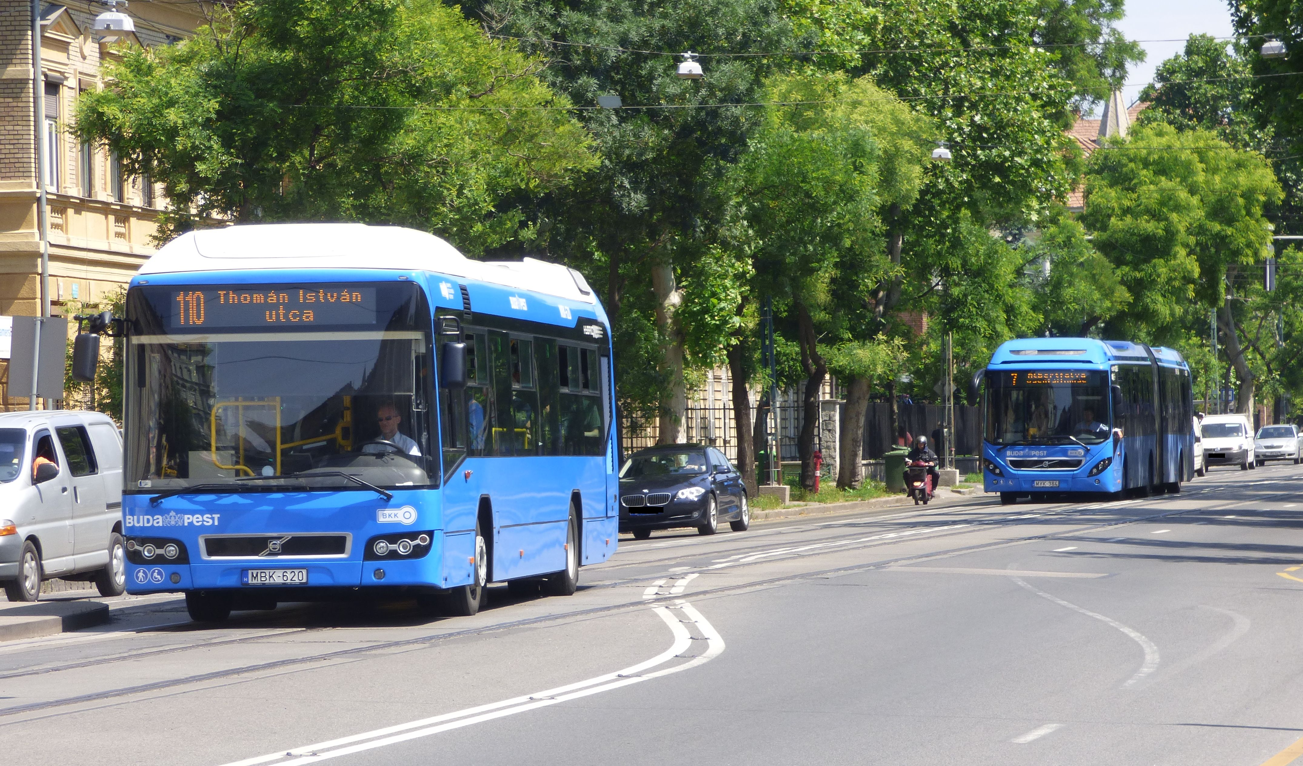 110-es jelzésű Volvo 7700Hybrid és 7-es jelzésű Volvo 7900A Hybrid buszok a Reiner Frigyes parknál